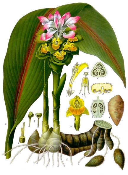 Zitwerwurzel. A Pflanze in natürl. Grösse unter Benutzung einer Zeichnung im Bot. Mag. und Nees v. Esenbeck; B Blatt, desgl.; 1 Blüthe im Längsschnitt nach Nees v. Esenb.; 1a Blüthe von C. aromatica nach Berg und Schmidt, um die Form einer Curcumablüthe zu zeigen, vergrössert; 2 Staubgefäss nach Nees v. Esenb.; 3 dasselbe im Querschnitt von C. aromatica, nach Berg; 4 Fruchtknoten im Längsschnitt, desgl.; 5 derselbe im Querschnitt, desgl.; 6 Fruchtknoten mit dem unteren Theil des Griffels und den 2 grundständigen, unfruchtbaren Staubgefässen (Staminodien), desgl.; 7 oberer Theil des Griffels mit Narbe von C. aromatica nach Berg u. Schmidt, desgl.; 8 eine getrocknete Wurzel, natürl. Grösse.